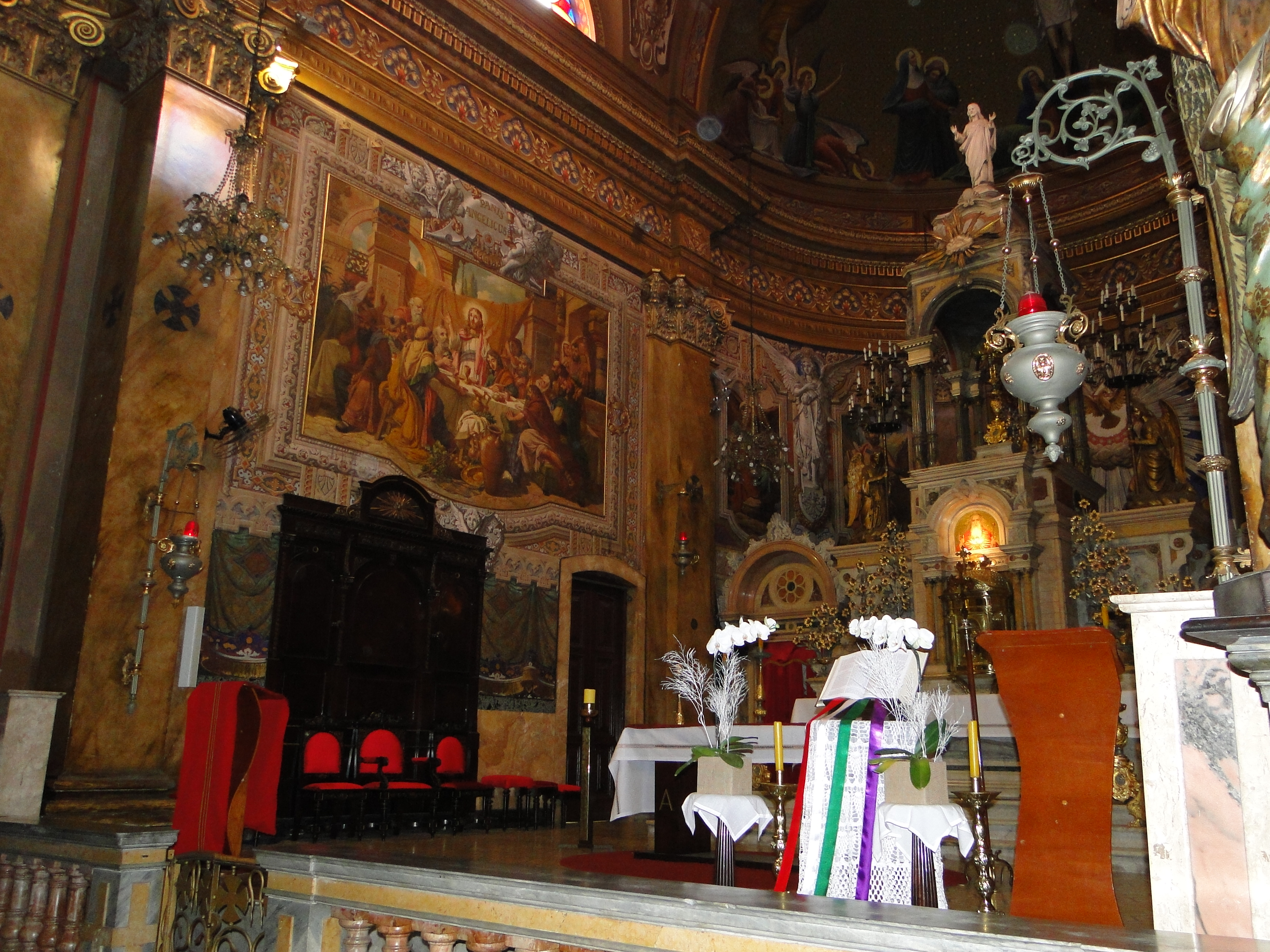 Detalhes do altar-mor do Santuário do Sagrado Coração de Jesus, em São Paulo (SP), Brasil.